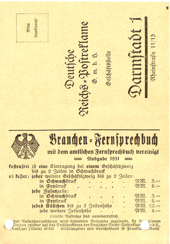 Postkarte für Eintrag in das Branchen-Fernsprechbuch Ausgabe 1931